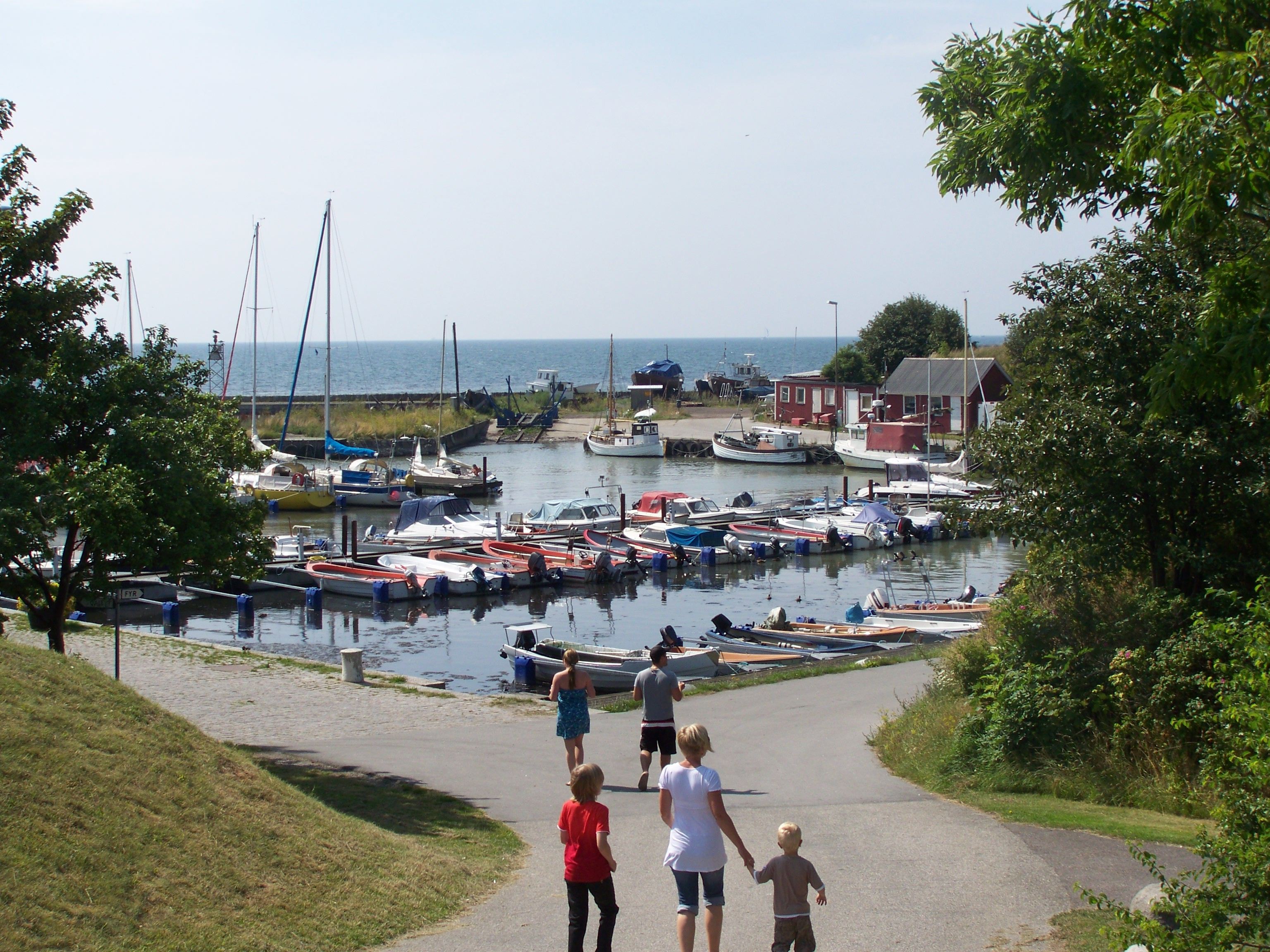 In Schweden. Smygehuk